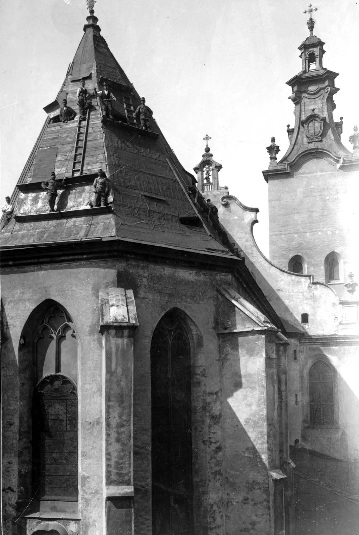 1916 рік. Австрійські військові знімають мідну бляху з даху Латинської катедри у Львові.